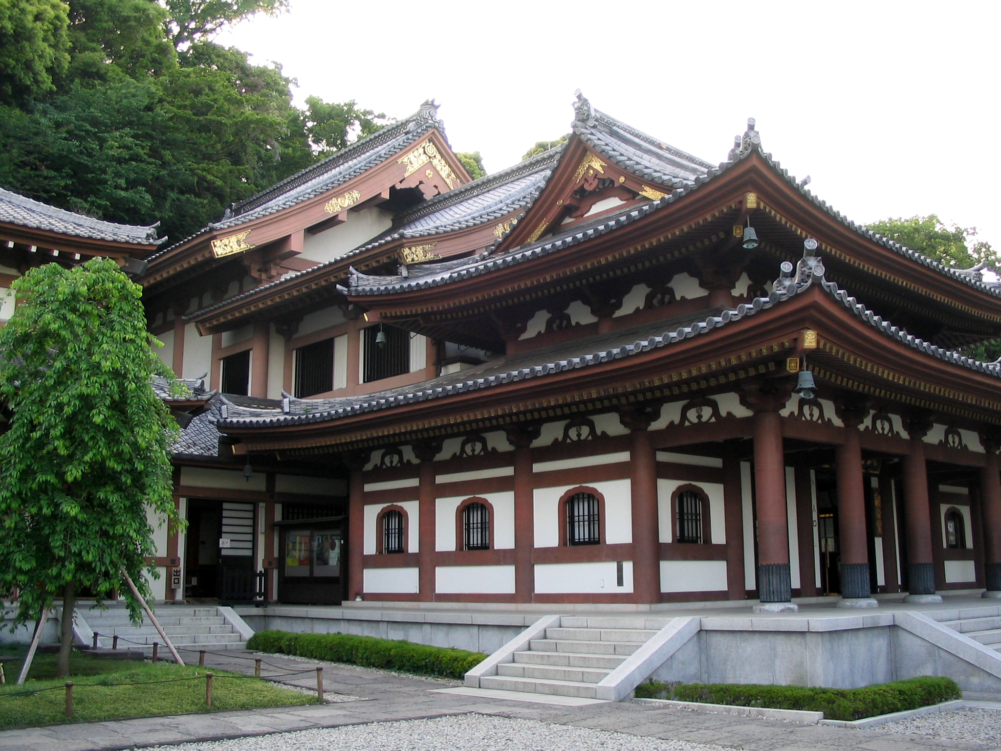 Kannon-dou Hall, Kamakura, Japan